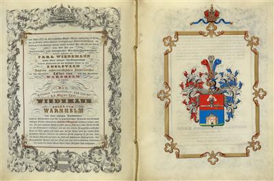 Wappen aus dem Adelsdiplom von Franz Joseph I. (Kaiser von Österreich 1848-1916) für Carl Wiedemann, Major des Linien Infanterie Regiments Nr. 56, mit Verleihung des Prädikates "Edler von Warnhelm". Text des Adelsdiploms mit ausführlicher Würdigung der militärischen Biographie des 1804 in Zara in Dalmatien (Zadar, Kroatien) geborenen Adelstandserwerbers ("... Zu Unserer besonderen Zufriedenheit haben wir auch erfahren, daß Carl Wiedemann den Feldzug in Italien im Jahre 1848 mitgemacht, am Isonzo gefochten, bei den Einnahmen von Udine, von Vicenza, in der Schlacht von Custozza, dann bei den Affairen Volta und Mailand Theil genommen und sich stets brav gehalten habe. Bei Custozza leicht blessiert, wurde er im Armeebefehle Unseres Feldmarschalls Grafen Radetzky vom 19 September 1848für Tapferkeit und Wohlver halten öffentlich belobt ..."). Adelsdiplom ausgestellt Wien, 23. November 1852, mit eigenhändiger Unterschrift des Kaisers, Gegenzeichnung Inneminister Alexander von Bach und Ministerialrat Friedrich Sachse von Rothenberg. Pergamentlibell, 7 Seiten, gestochene Bordüre, goldgehöhte Kalligraphie, Wappendarstellung, MoireInnenspiegel mit goldgeprägter Bordüre. Roter Samteinband mit Blindprägung und goldgeprägter Doppeladlerdarstellung, anhängendes Siegel in Metallkapsel.